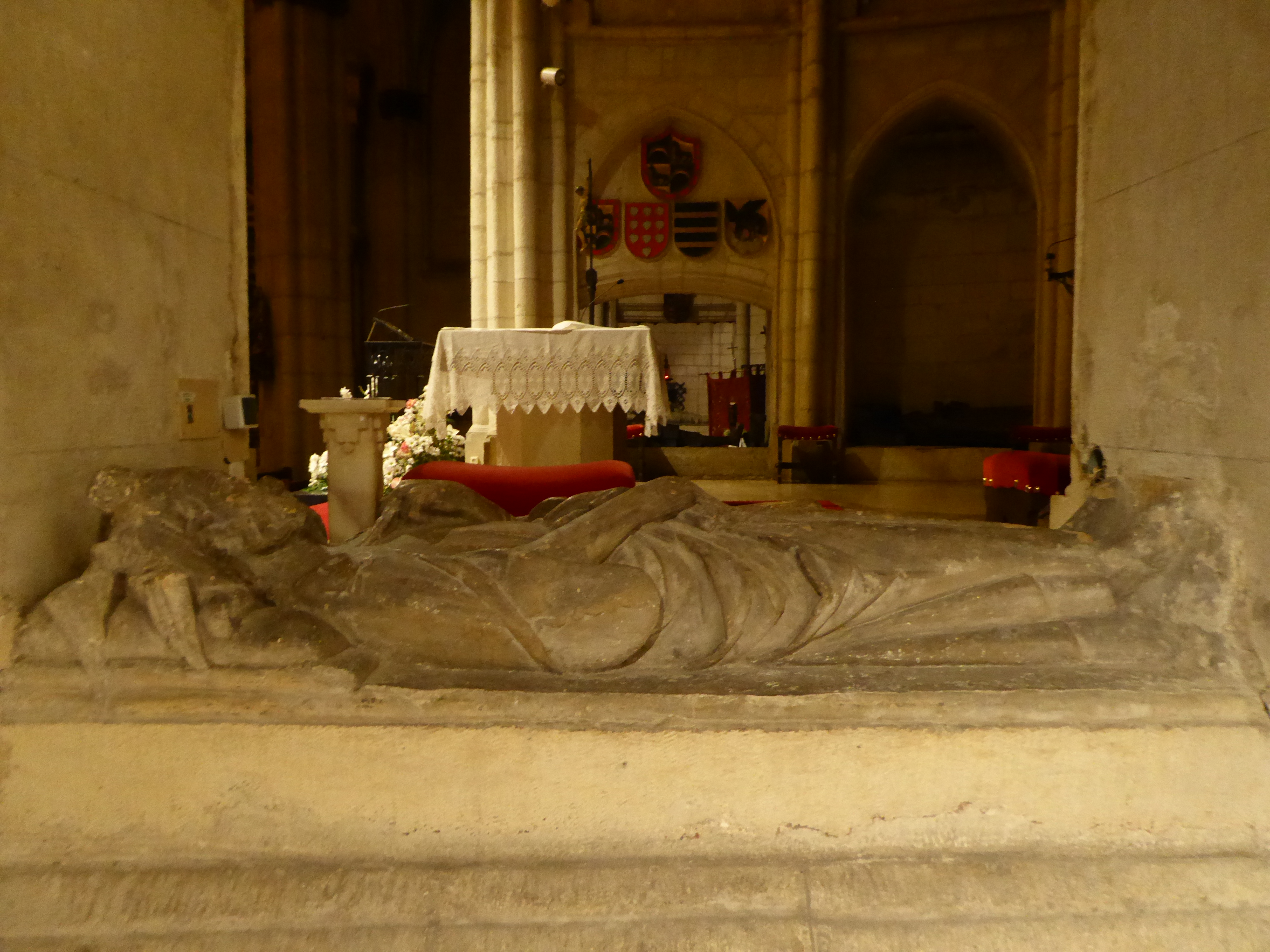 Iglesia de San Pedro Apóstol. Sepulcro de Diego Martínez de Álava